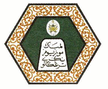 Logo Muzium Terengganu